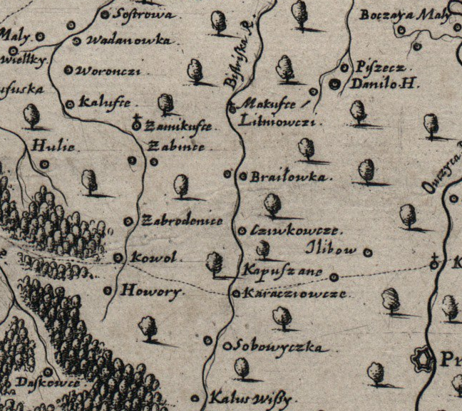 с.Заборознівці на карті Боплана XVII ст. Поряд зображені Ковалівка і Жабинці, як окремі села. Пилипківці на цій карті відсутні.